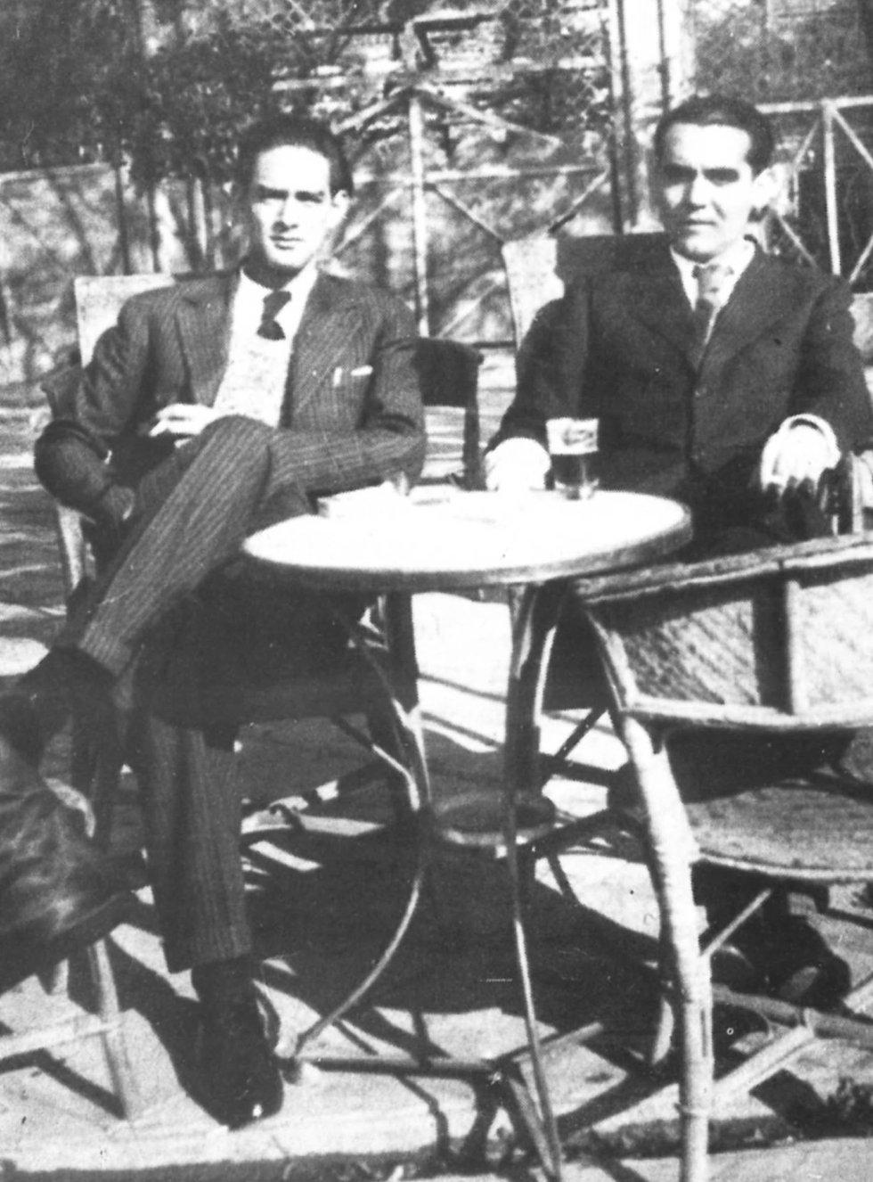 Federico García Lorca y Ernesto Pérez Güerra, en Madrid